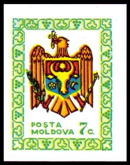 Первая почтовая марка Молдавии